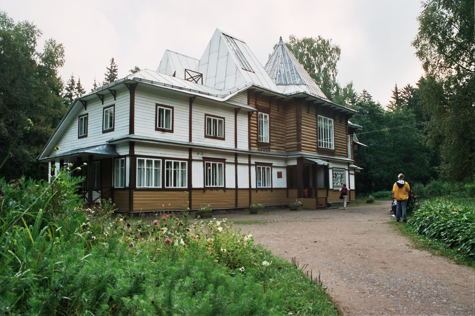 Penaten - het door hemzelf ontworpen en gebouwde huis van Ilja Repin te Repino.